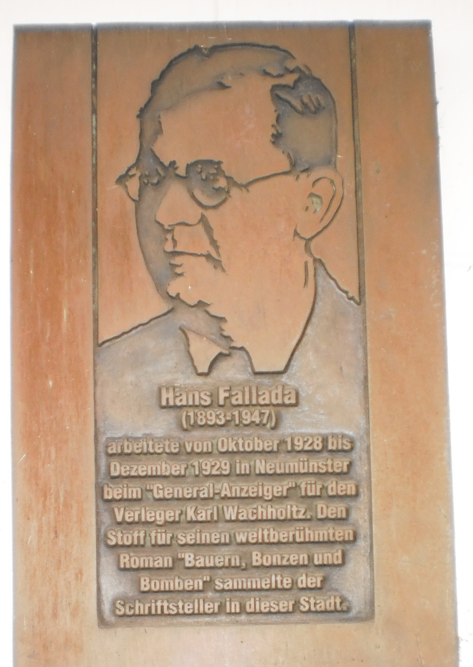 Hans Fallada - Broncetafel am Courierhaus in NMS